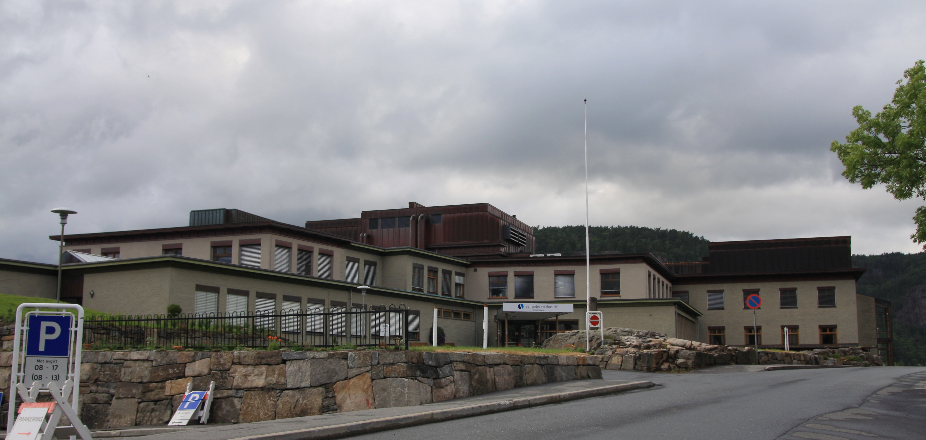 Flekkefjord sykehus